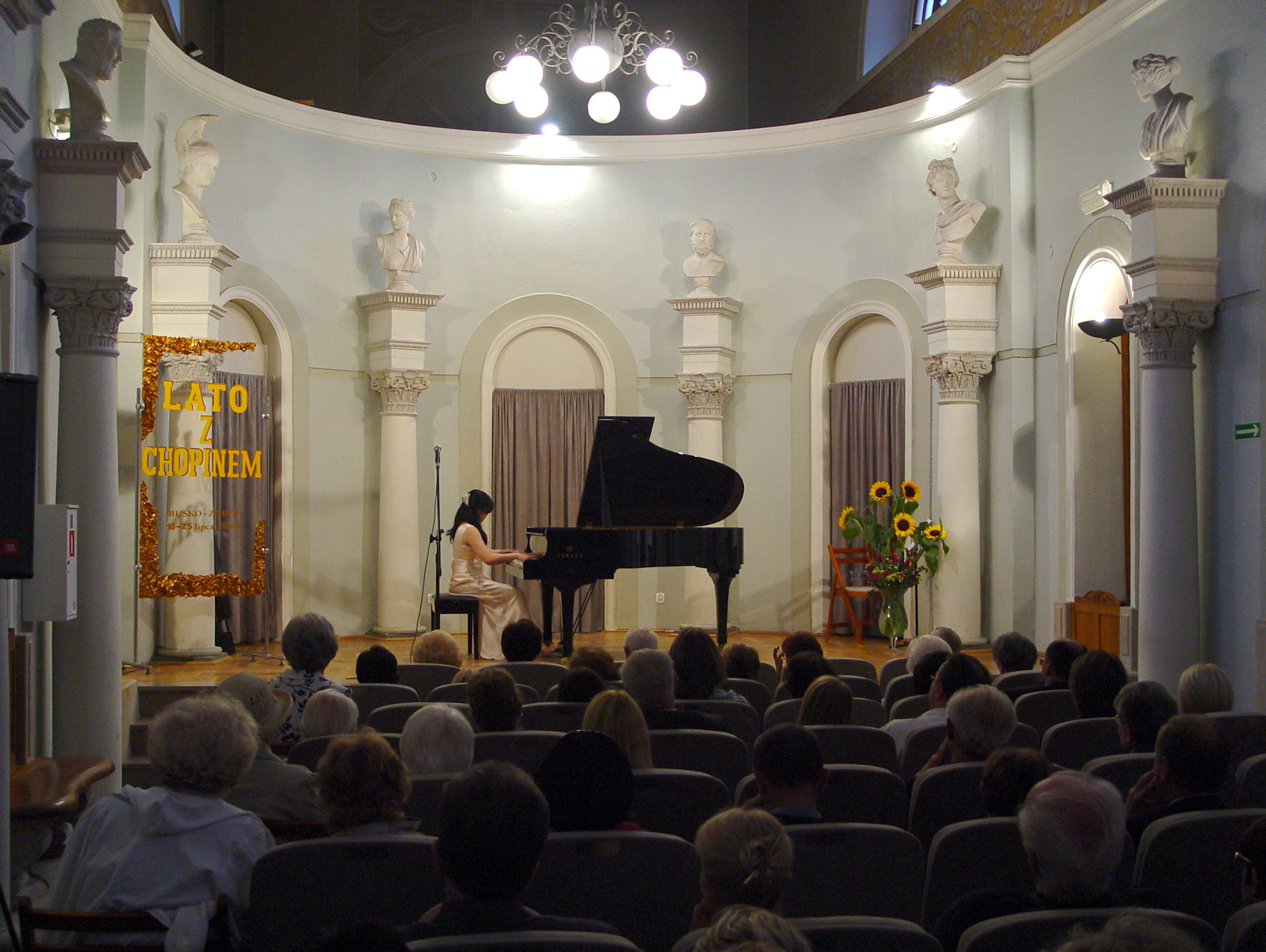 Lato z Chopinem, występ japońskiej pianistki Eri Iwamoto, Marconi, Busko-Zdrój, 16.07.2008.